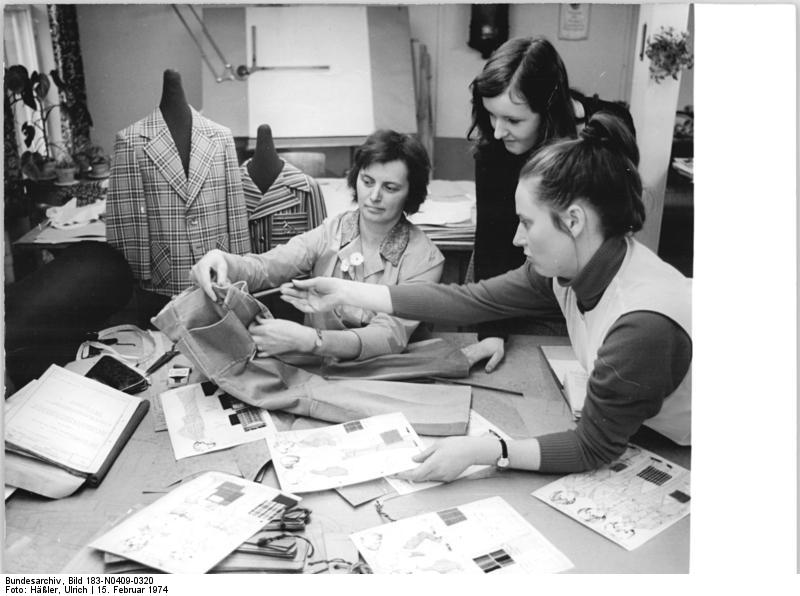 ADN-ZB-Häßler Mü-Schä 15.2.1974 Bez. Dresden: VEB Bekleidungswerk "Steppke" Görlitz In der Modellabteilung beraten die Bekleidungskonstrukteure Erika Schultze (l), Friederieke Meier (r) und Strudentenpraktikantin Christine Happke (m) über die modische Gestaltung der Kinderkonfektion.